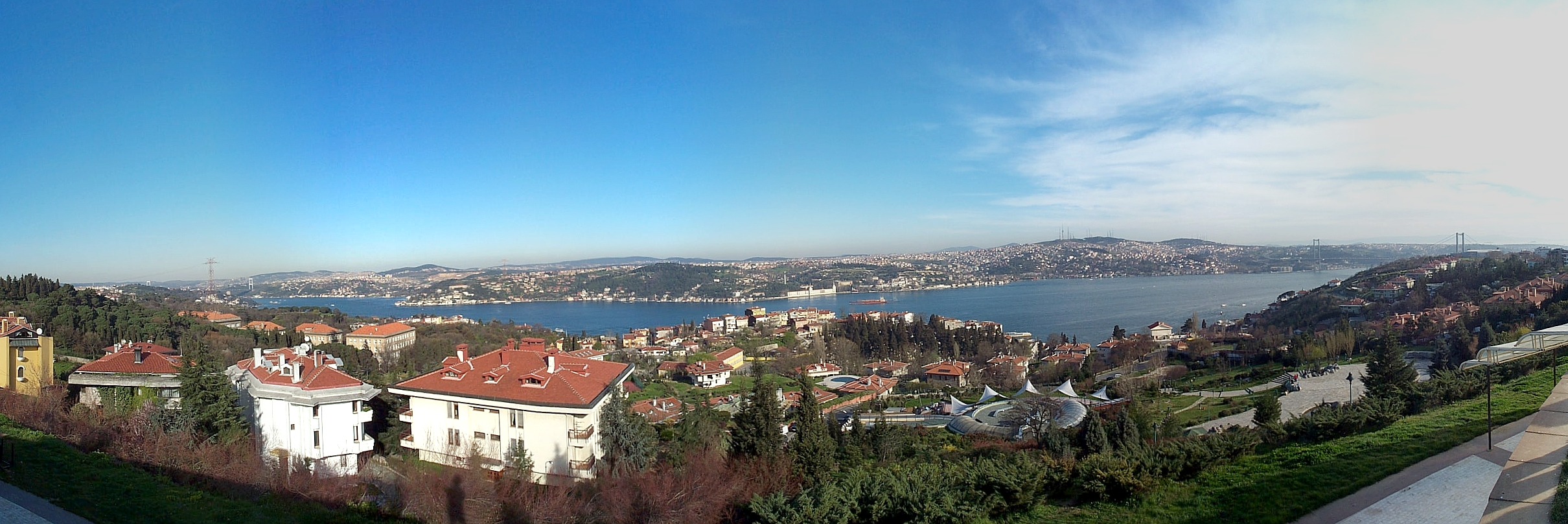 Istanbul Bogazici Ulus